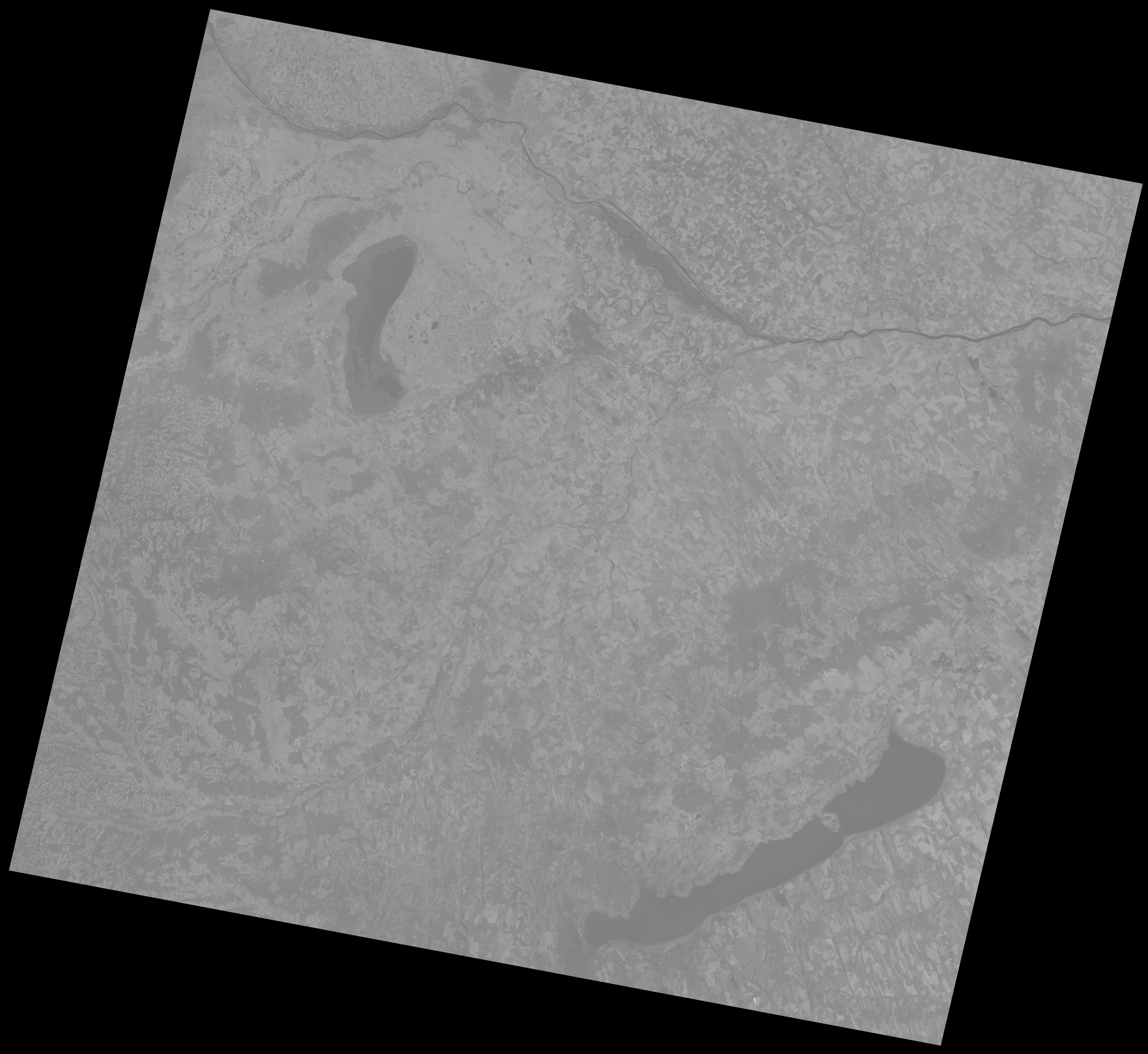 A Landsat-5 felvétele az Észak-Dunántúlról a termális infravörös (6-os) sávban